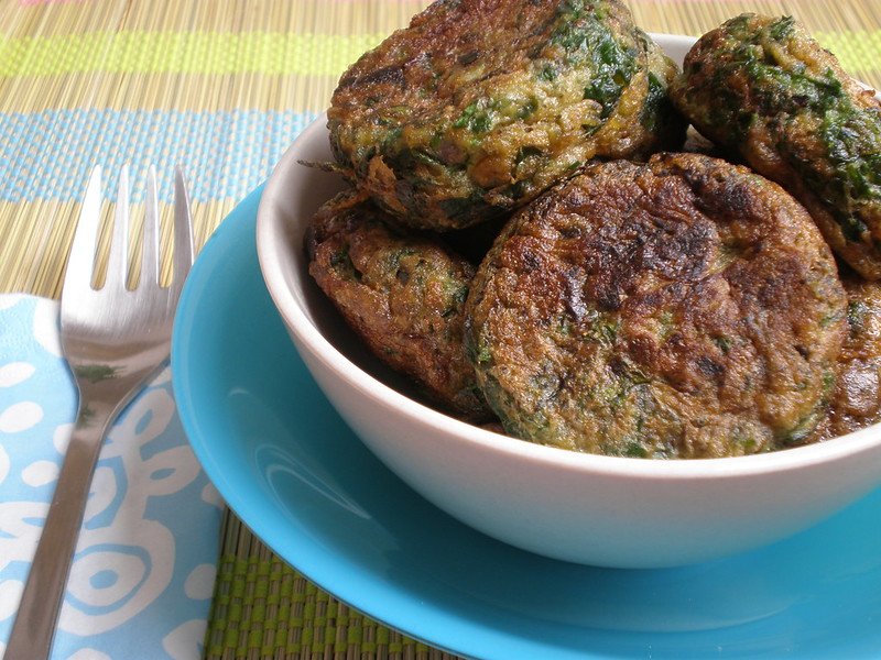 طبق العجة مكونة من البيض والبقدونس والبهارات والبصل، تقرص وتقلى وتقدم بهذا الشكل